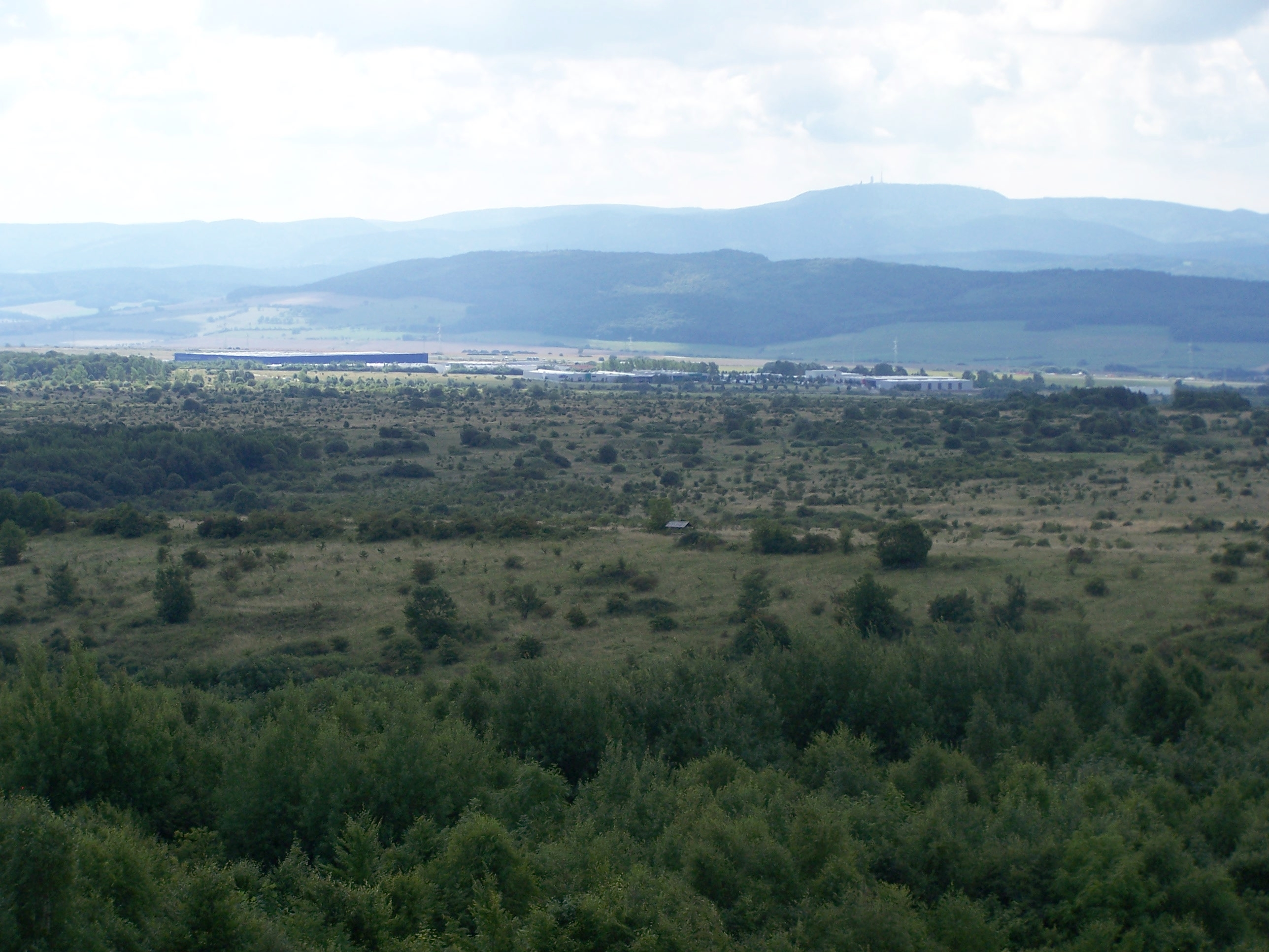 Aussichtsturm Hainichblick